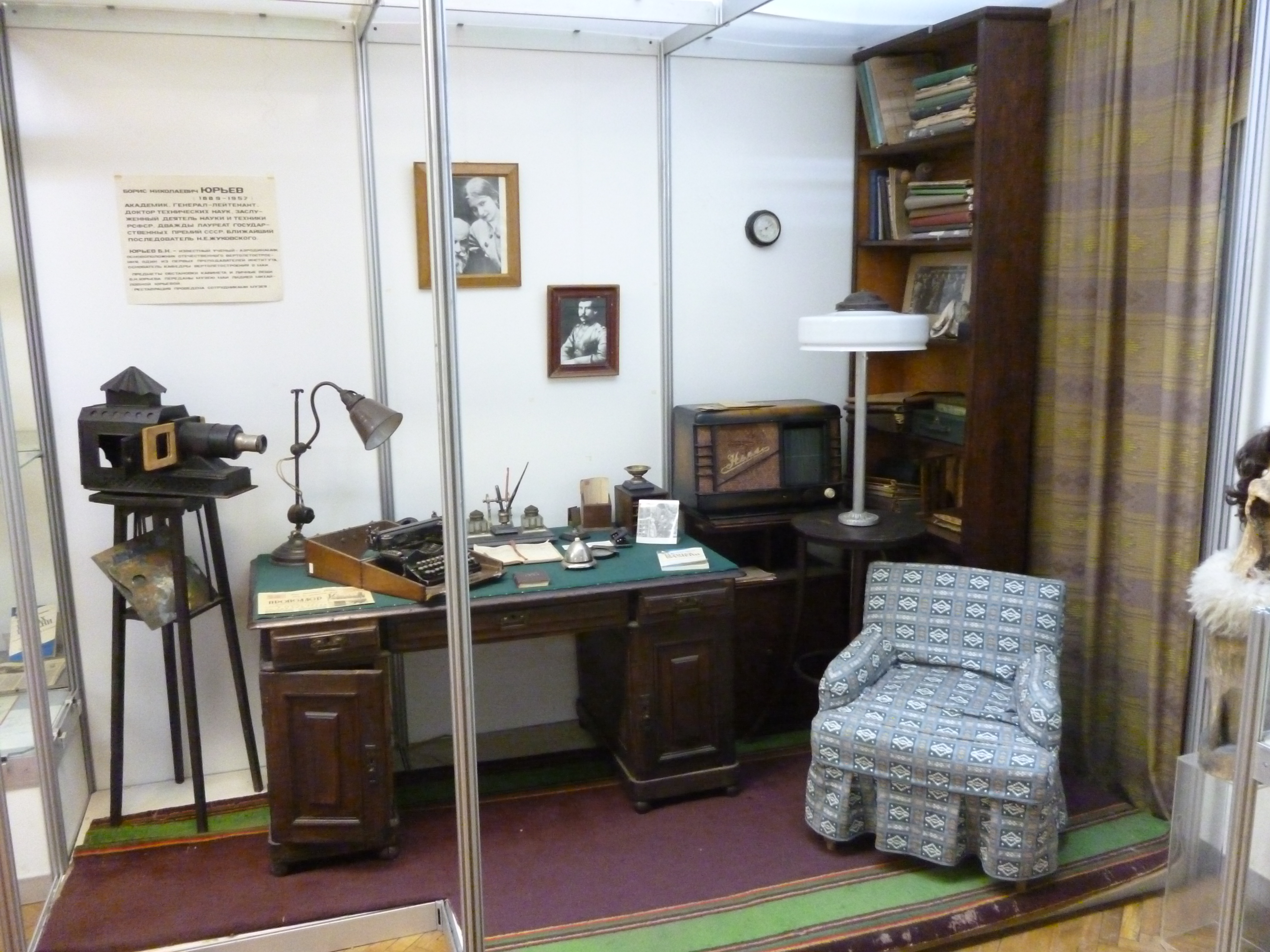 Кабинет Бориса Николаевича Юрьева в музее МАИ